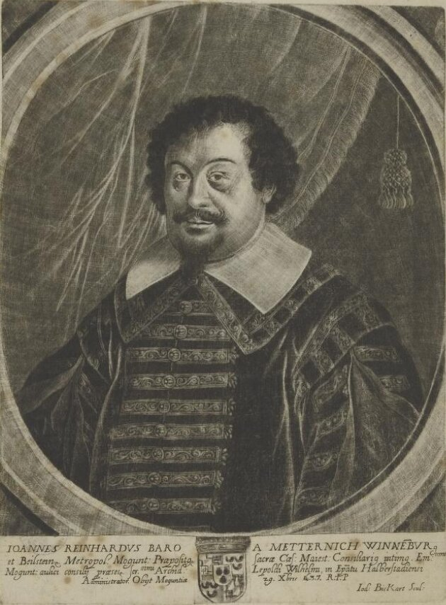 Johannes Reinhard von Metternich